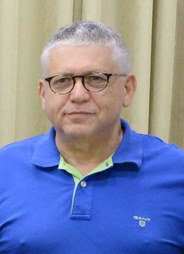 נשיא מדינת ישראל ראובן ריבלין מתעדכן בתוצאות תחרות ״מגן הכבוד לקבוצות הכדורגל המצטיינות במאבק באלימות ובגזענות. חברי הוועדה בראשות השופטת בדימוס עדנה בקנשטיין הם שופט הכדורגל לשעבר דני קורן, האנתרופולוגית וחוקרת הספורט ד"ר שלומית גיא, מודי בר-און, שחקנית נבחרת ישראל בכדורגל לשעבר סילבי ז'אן, חבר הוועד האולימפי איתן ברק ונציג הטוטו עומרי קולין.